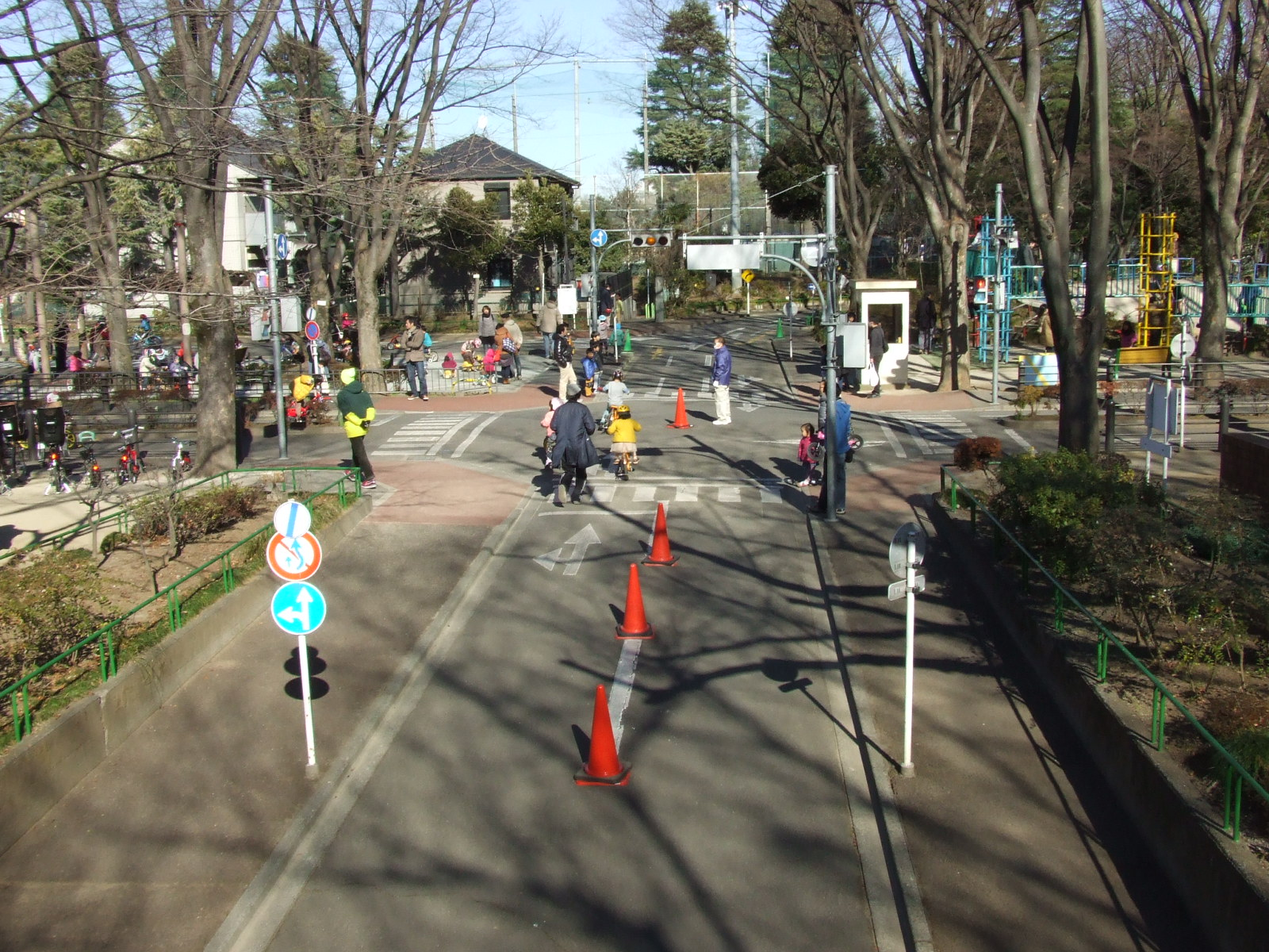 児童交通公園(杉並区)